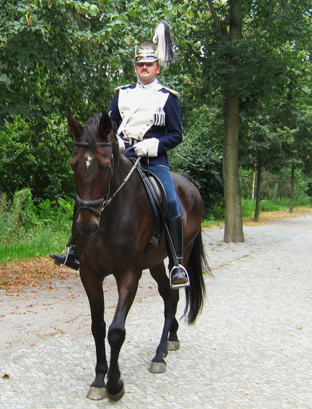 Kaiserliche Zeit (Historische Trachten in Berlin 2009)